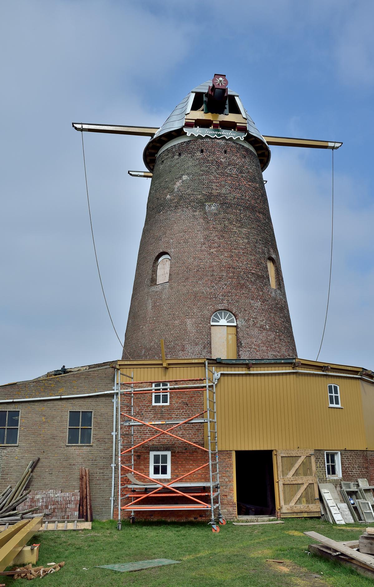 De Graanhalm, plaatsen kap